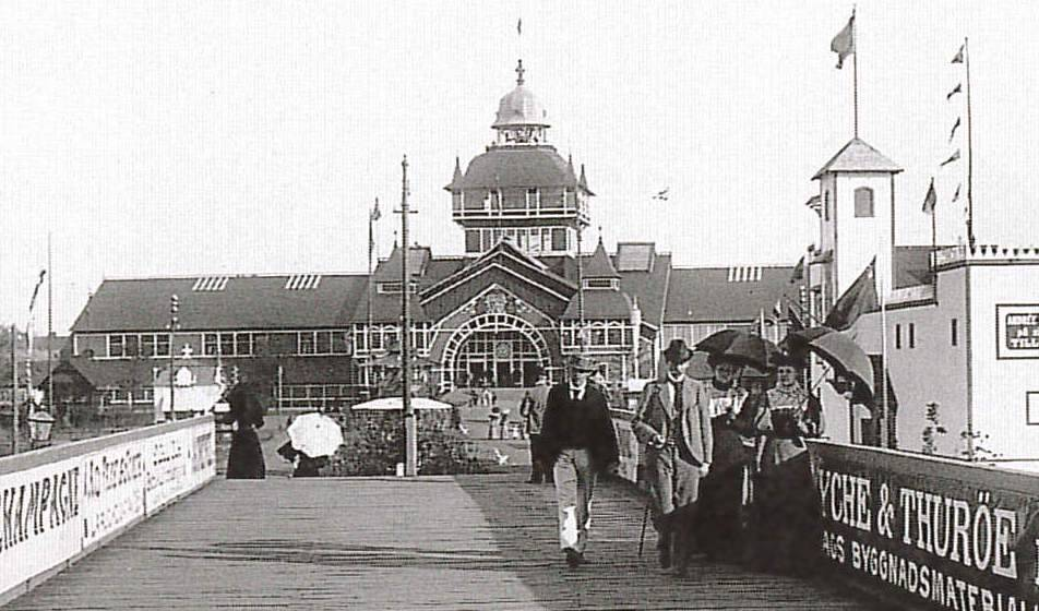 Bild tagen från Kungsbron mot Industrihallen under Malmöuställningen 1896. Tillhör Wåhlins samling, Domkyrkomuseet, Lund.